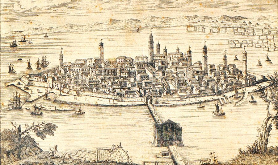 Veduta Kopra